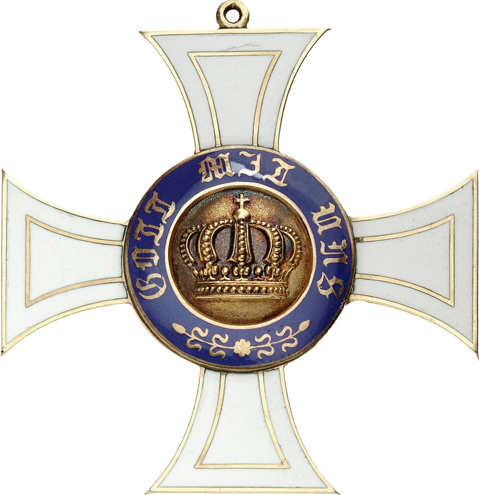 Kleinod zum Großkreuz des Königlichen Kronenordens (Preußen): Kleinod zur I. Klasse (3. Modell), Avers.